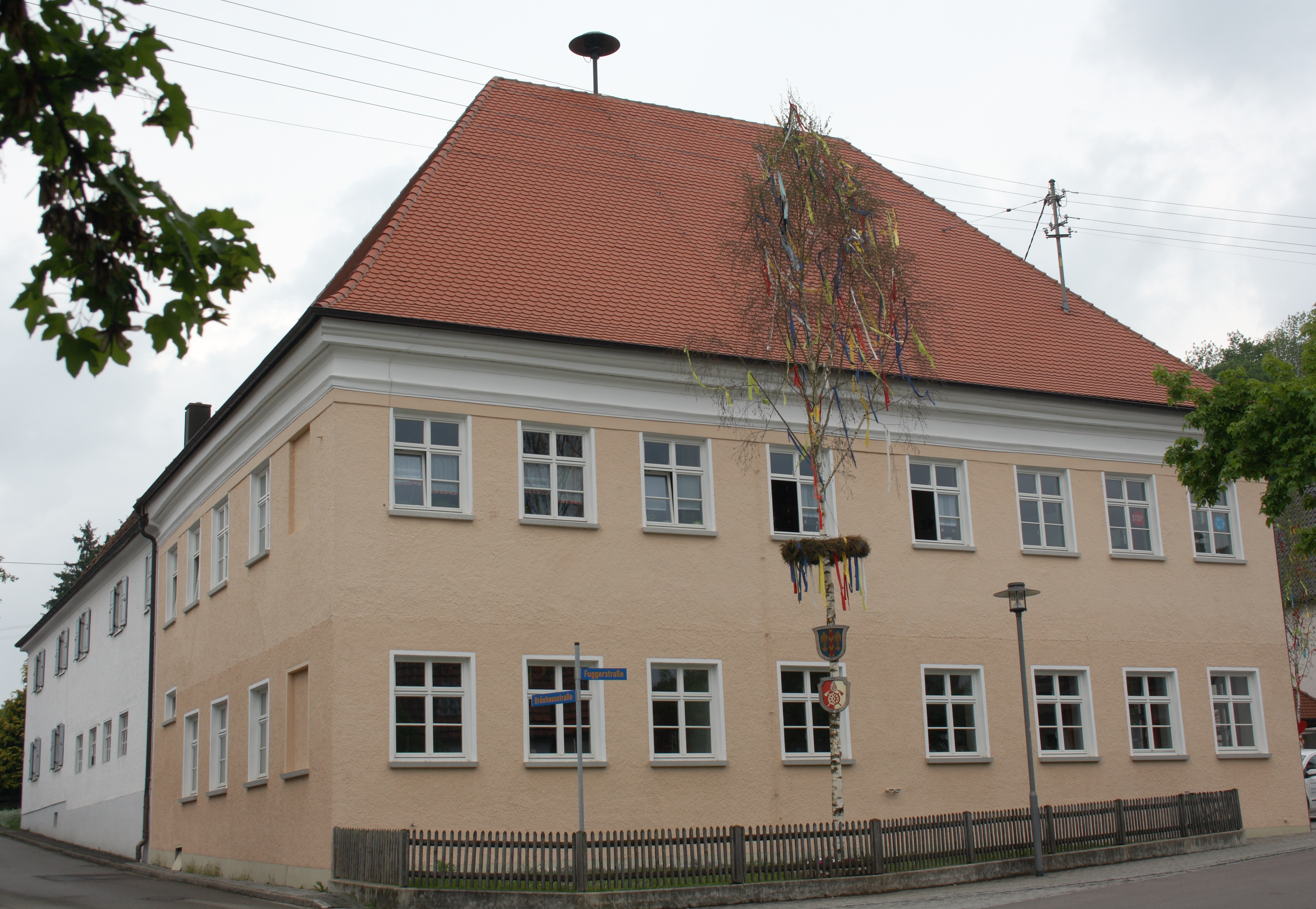 ehemaliges Fugger'sches Amtshaus in Glött im Landkreis Dillingen an der Donau (Bayern)